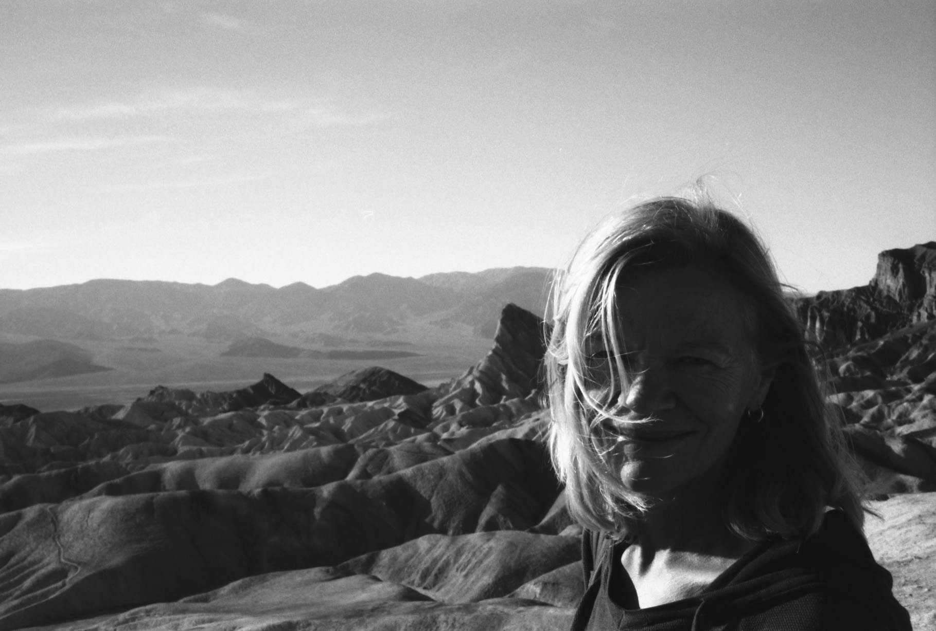 Heidi Specogna, Schweizer Filmemacherin. Foto am Zabriskie Point, Death Valley (USA)